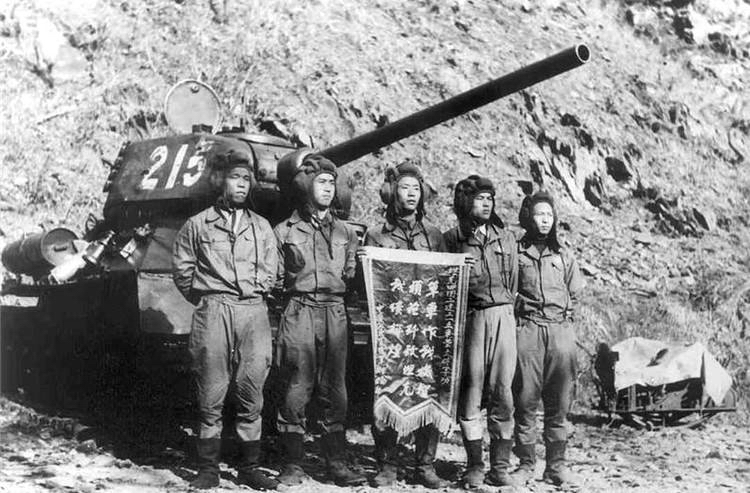 中国人民志愿军坦克部队杨阿如车组的编号215号T-34-85坦克。